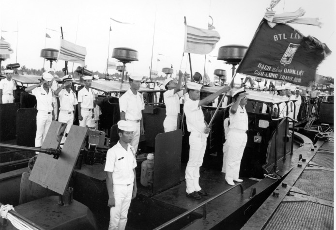 The flag of South Vietnam in September 1969.